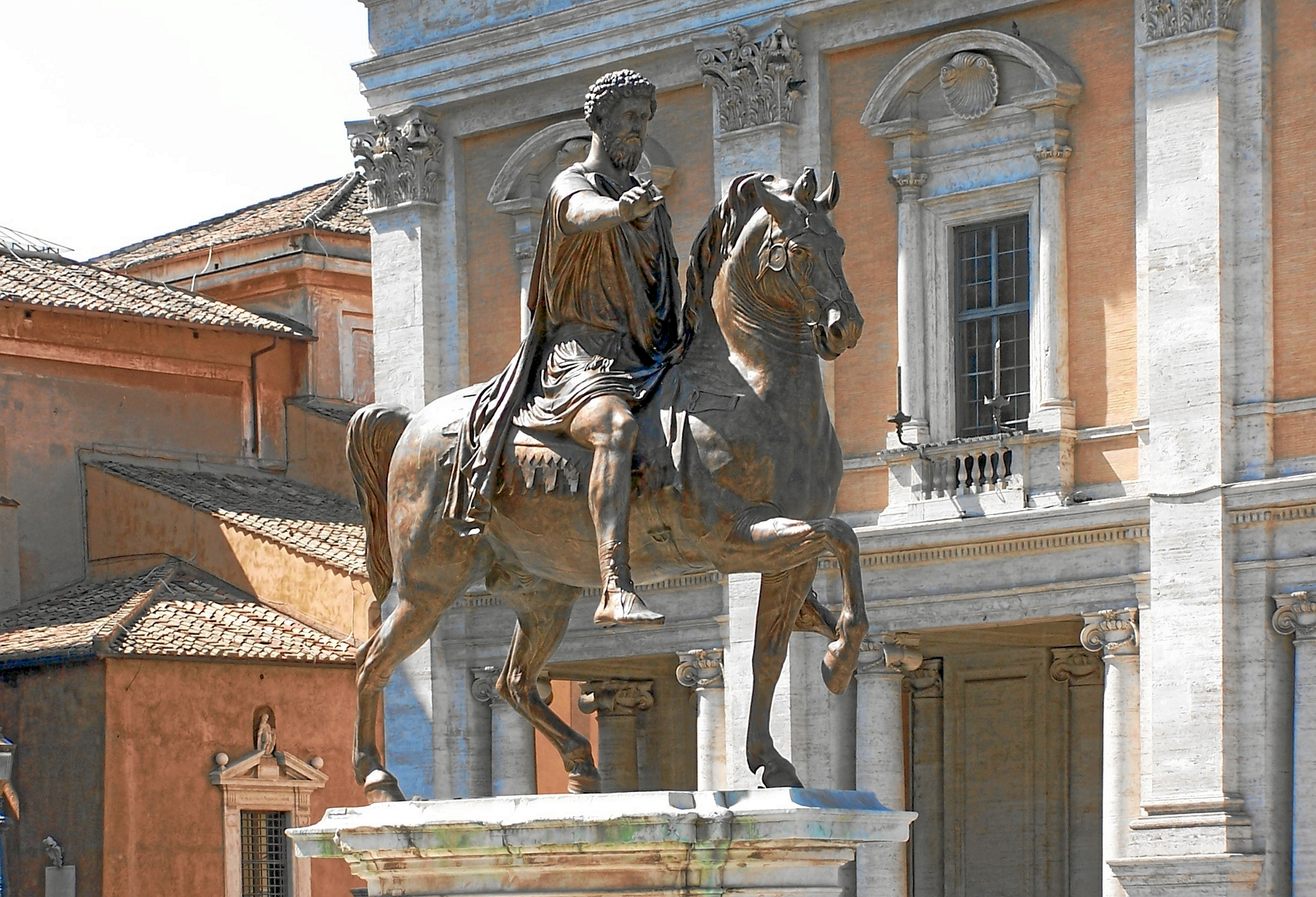 Reiterstandbild Marc Aurels, Kapitol, Rom